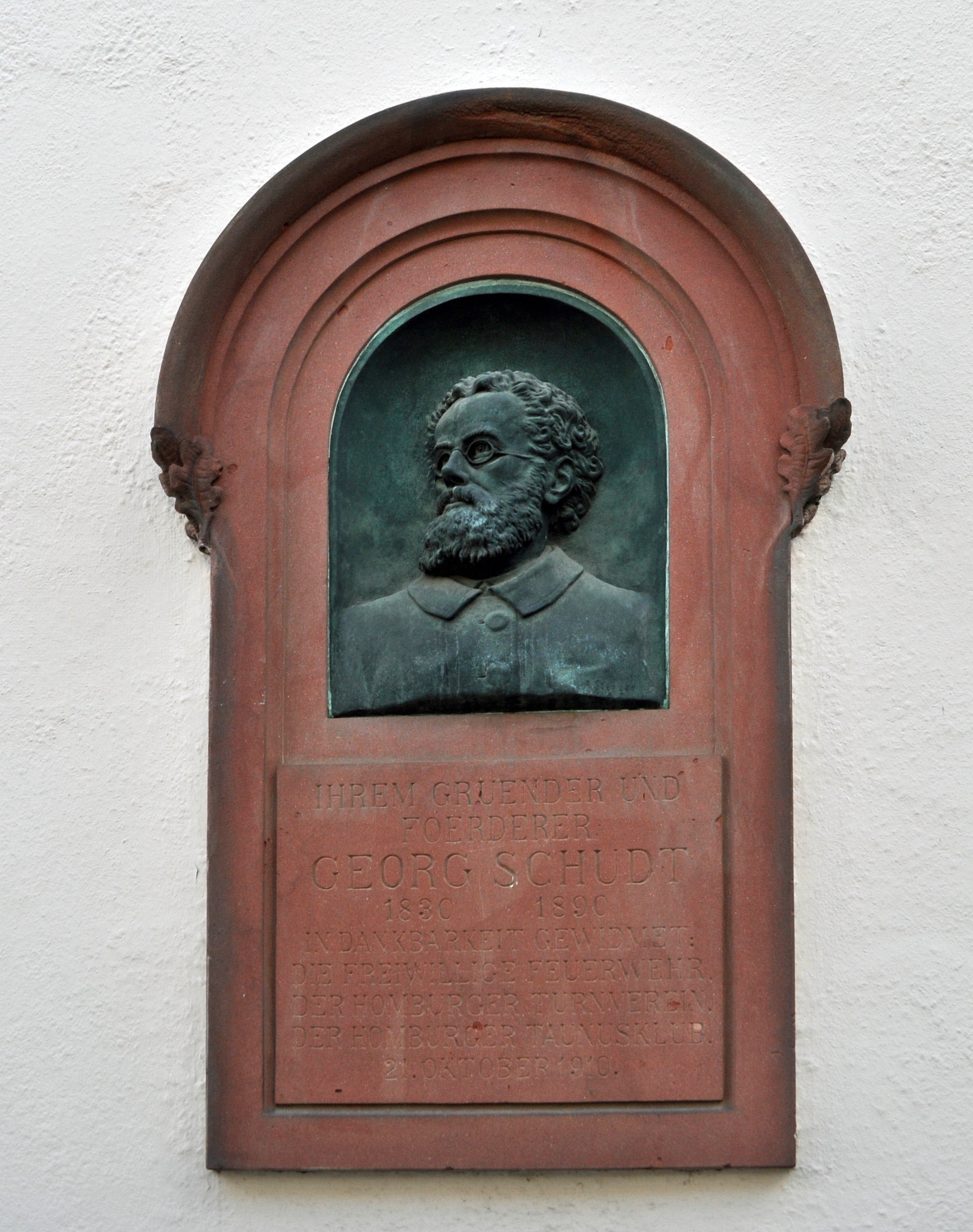 Bad Homburg, Dorotheenstraße 5. Unter Denkmalschutz steht das am 21. Oktober 1910 an der Außenwand der Turnhalle angebrachte Denkmal für Georg Schudt (1830-1890). Mit dem, ebenfalls von Kacobi gestalteten Relief wurde der Buchdruckereibesitzer, Herausgeber des Taunusboten, Mitbegründer des Turnvereins, der freiwilligen Feuerwehr und Gründungsmitglied des Homburger Taunusclub Georg Schudt geehrt. Der Bronzeguss erfolgte durch die Firma Gebrüder Knodt, Frankfurt-Bockenheim.